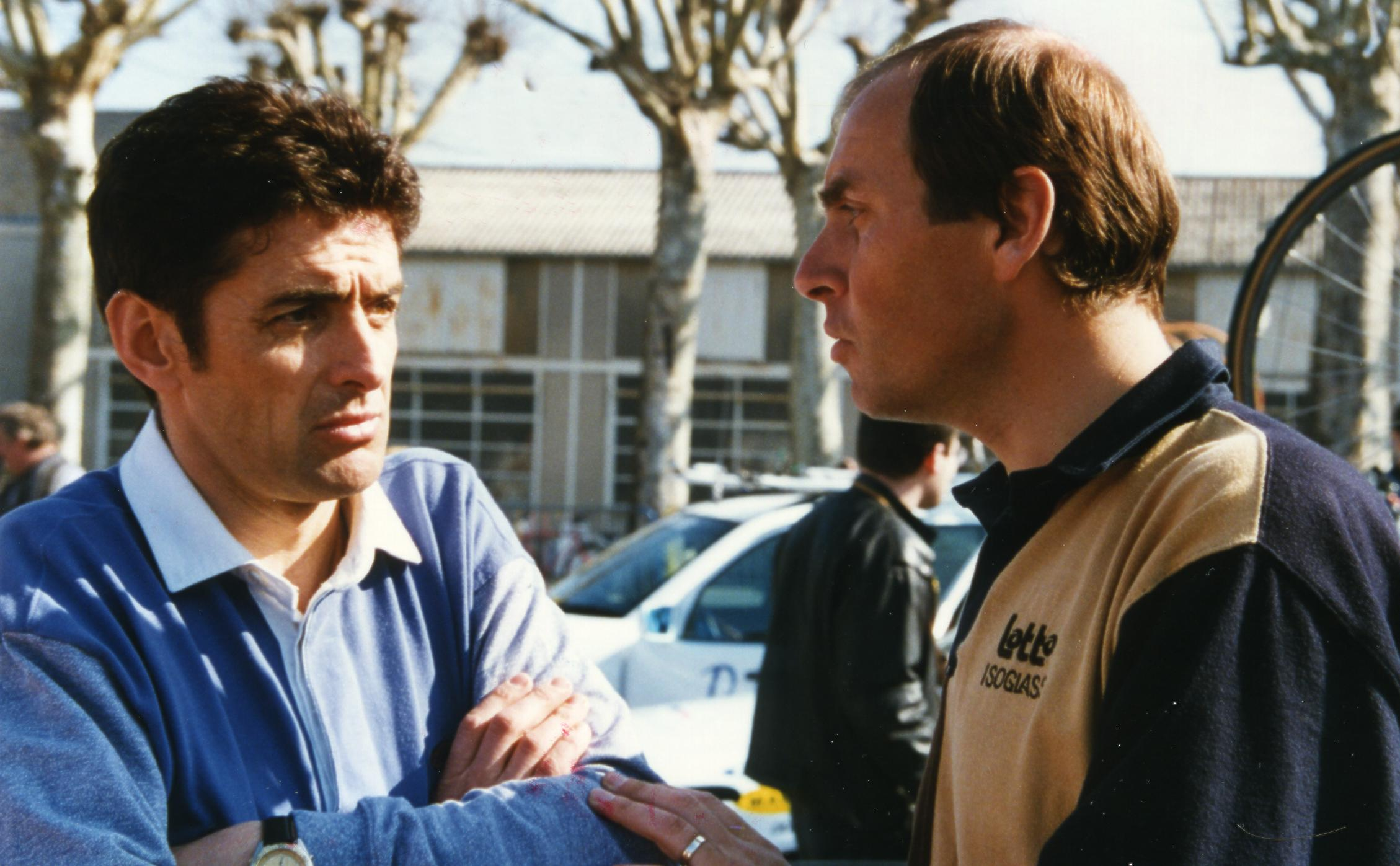 PARIS-NICE 1997